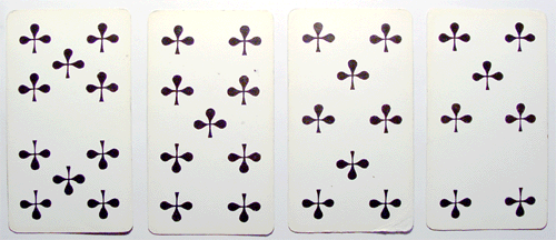 Cego Kartenspiel: Die 4 leeren Kreuz Karten